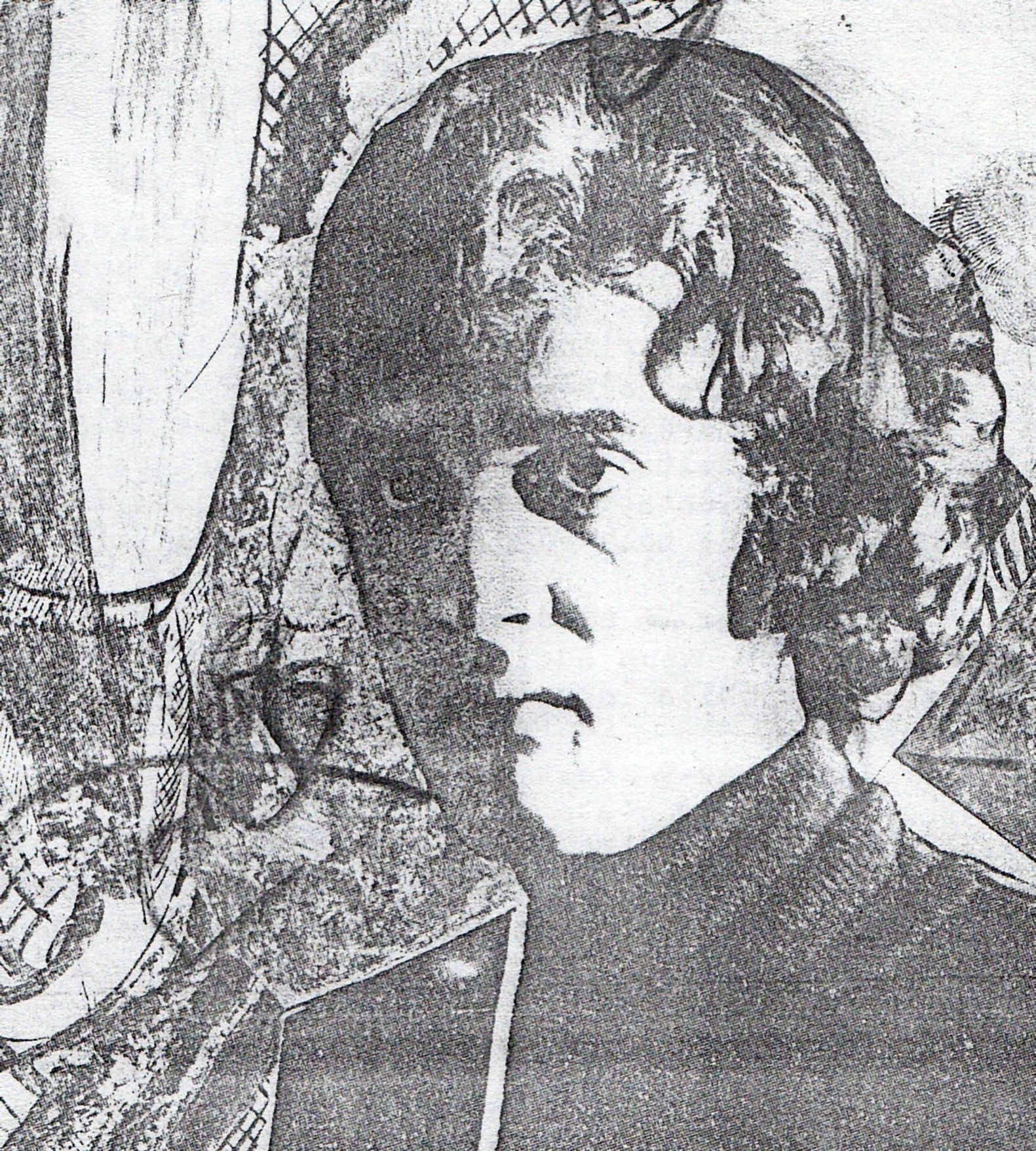 Fotografie Corneliu Ionescu1979 publicată în Revista Viața Studențească din 12 decembrie 1979